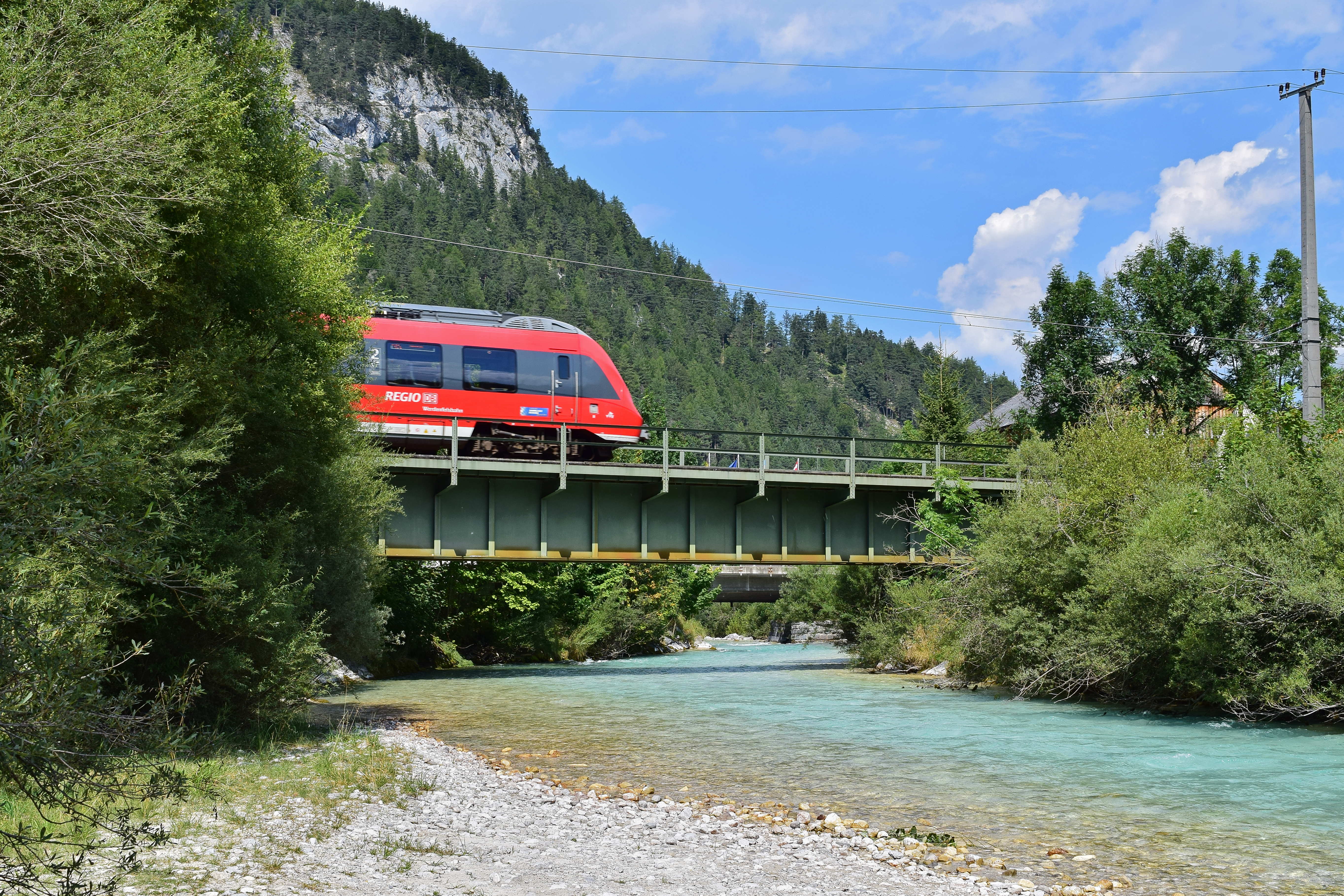 Die Isar, die Isarbrücke der Mittenwaldbahn, und ein DB-Regiozug der Werdenfelsbahn